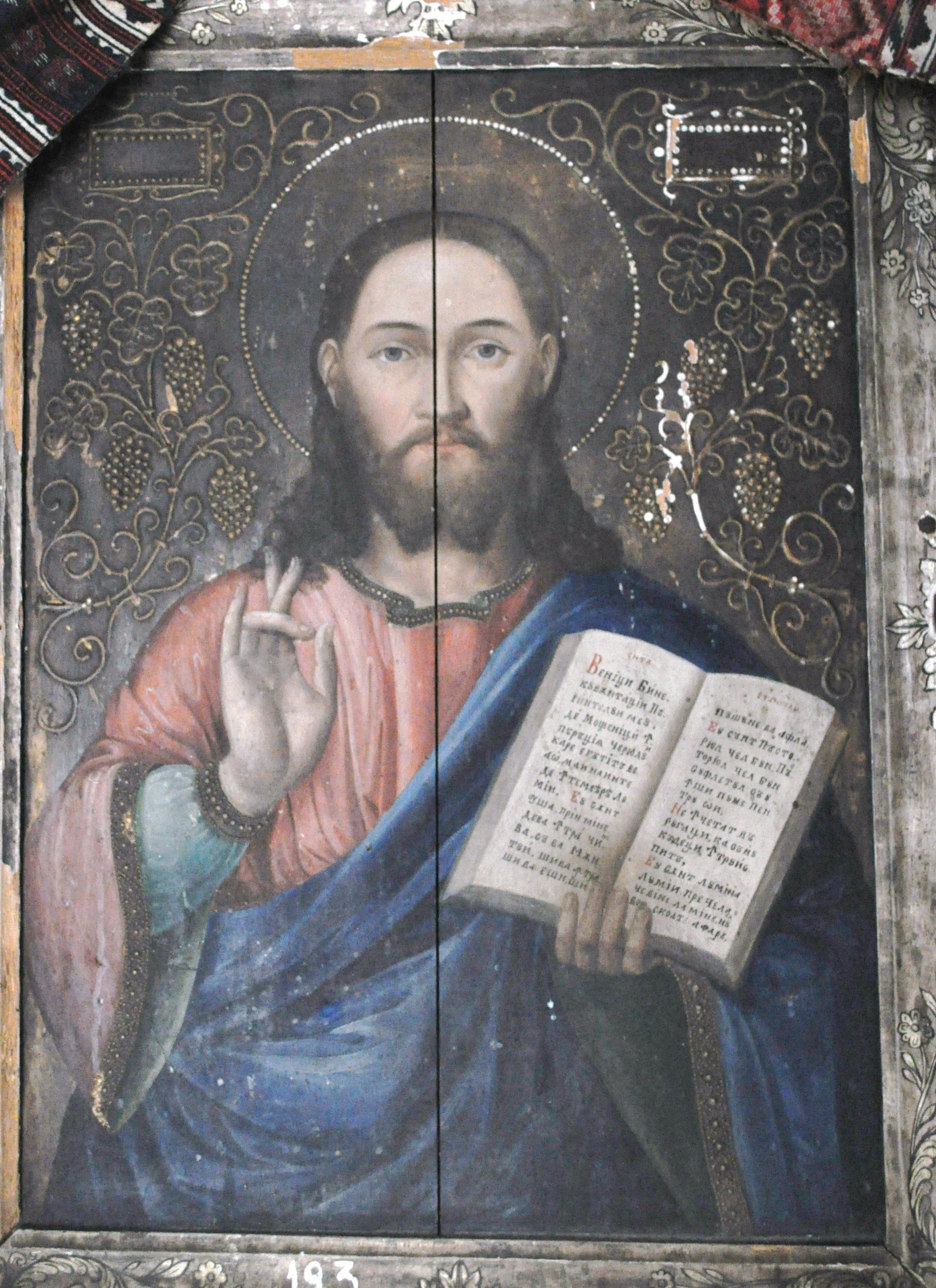 Biserica de lemn „Cuvioasa Paraschiva” din Pianu de Sus, județul Alba